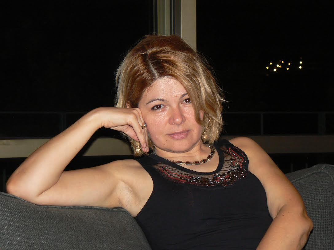 Rodica Draghinescu in Griechenland, 2008